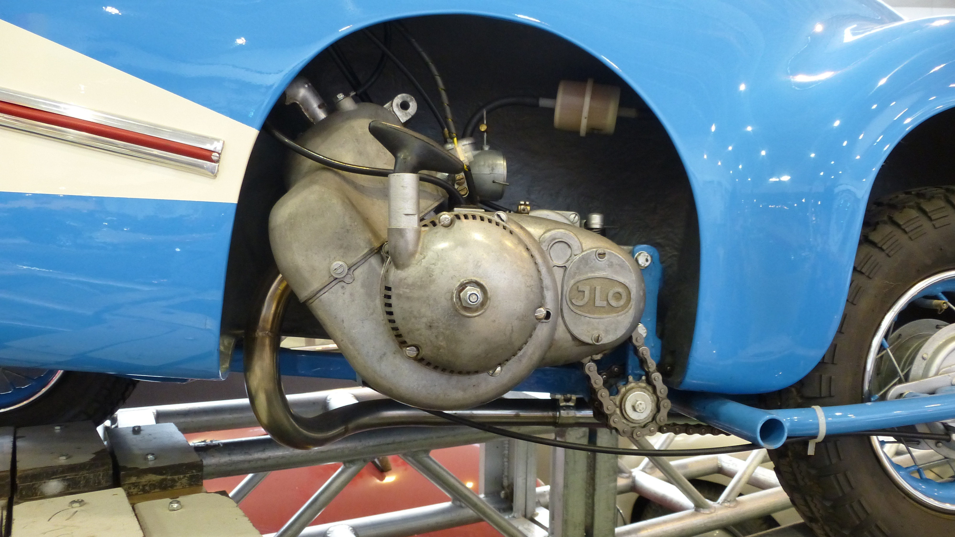 Mopetta GmbH Mopetta Nachbau von Andy Carter